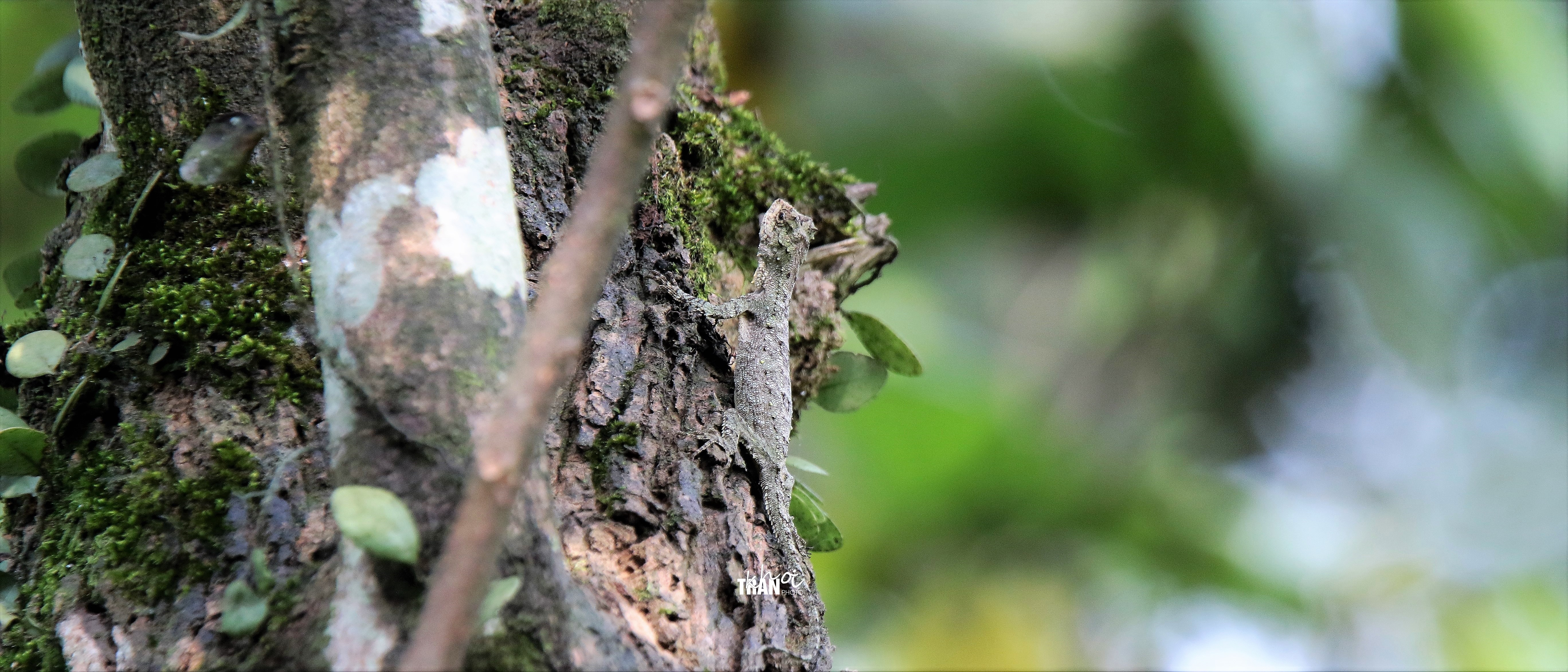 Draco obscurus in Bavi moutains